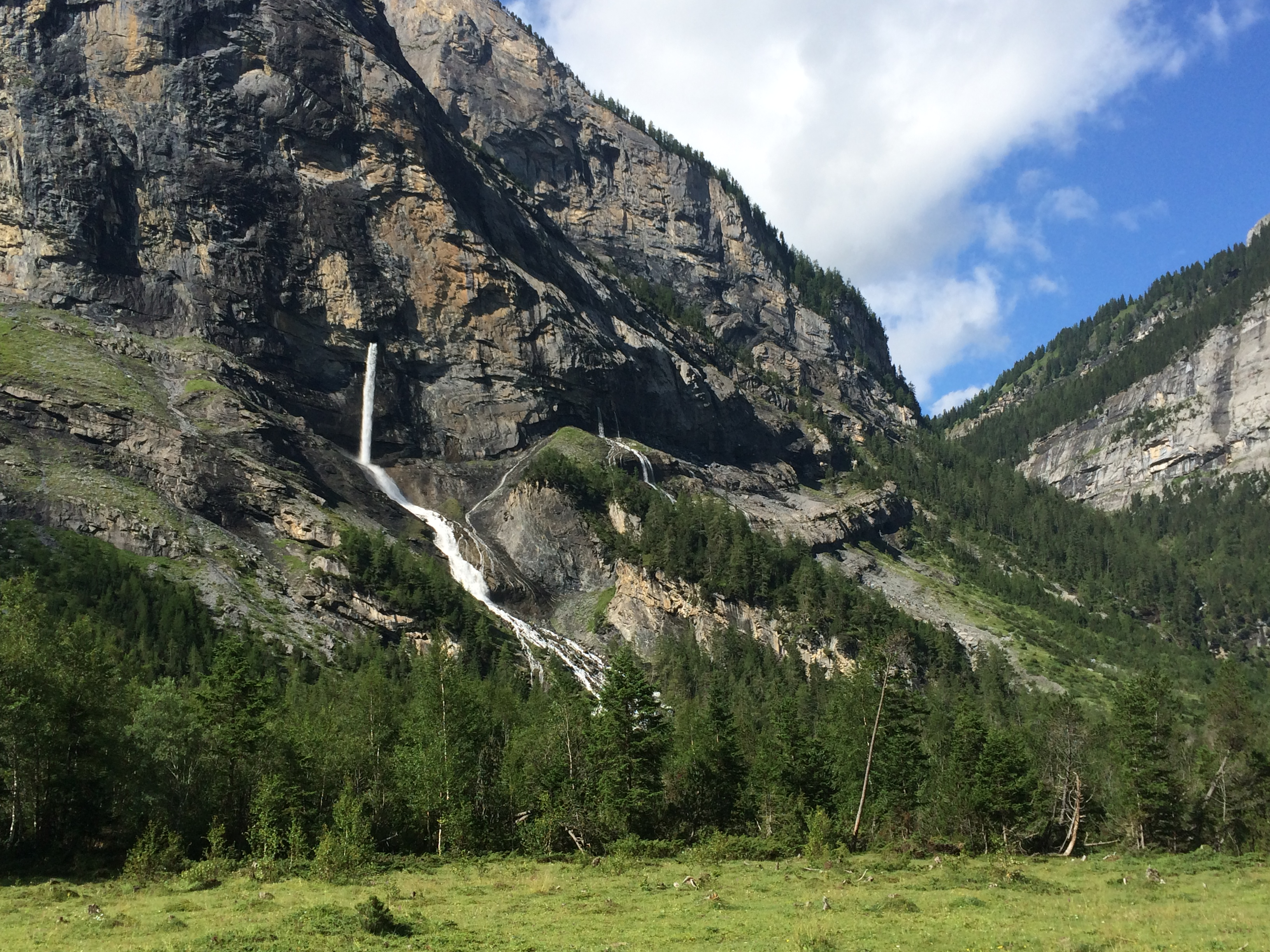 Gasterntal Geltibach Wasserfall